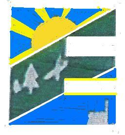 Escudo del partido de Ezeiza